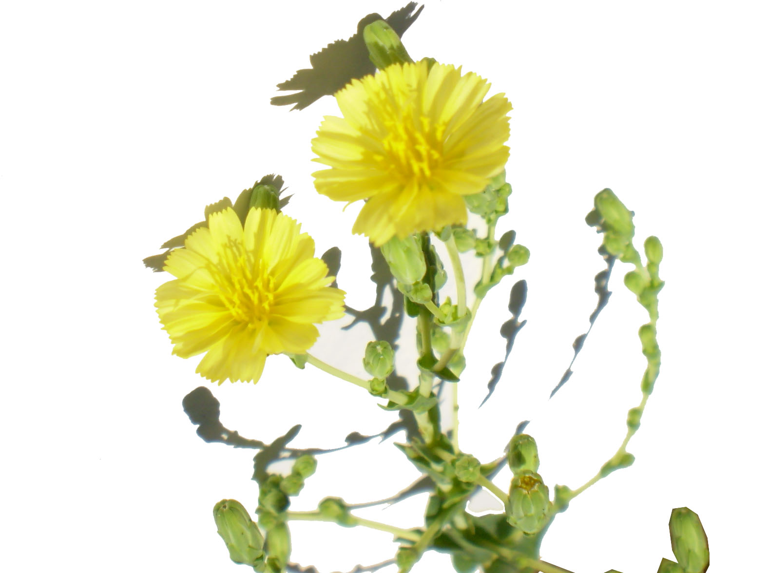 DXLINH tự chụp và truyền lên Wikipedia.